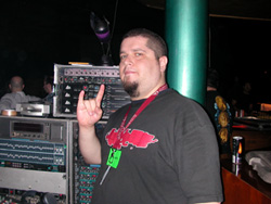 Bigsimon en concierto de Anthrax. Sala Macumba, Madrid.